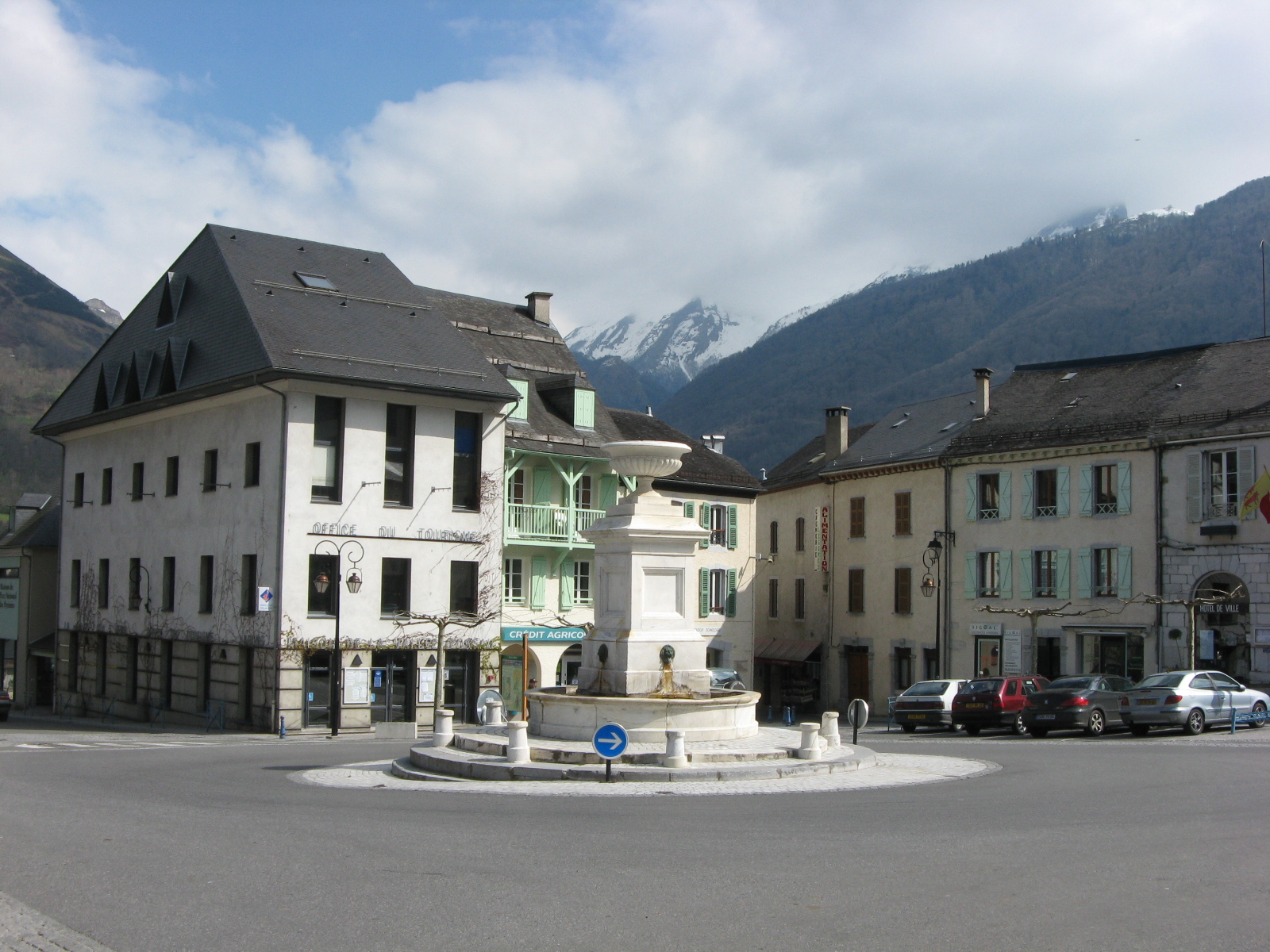 Office du tourisme de Laruns (Pyrénées-Atlantiques) (Pyrénées).